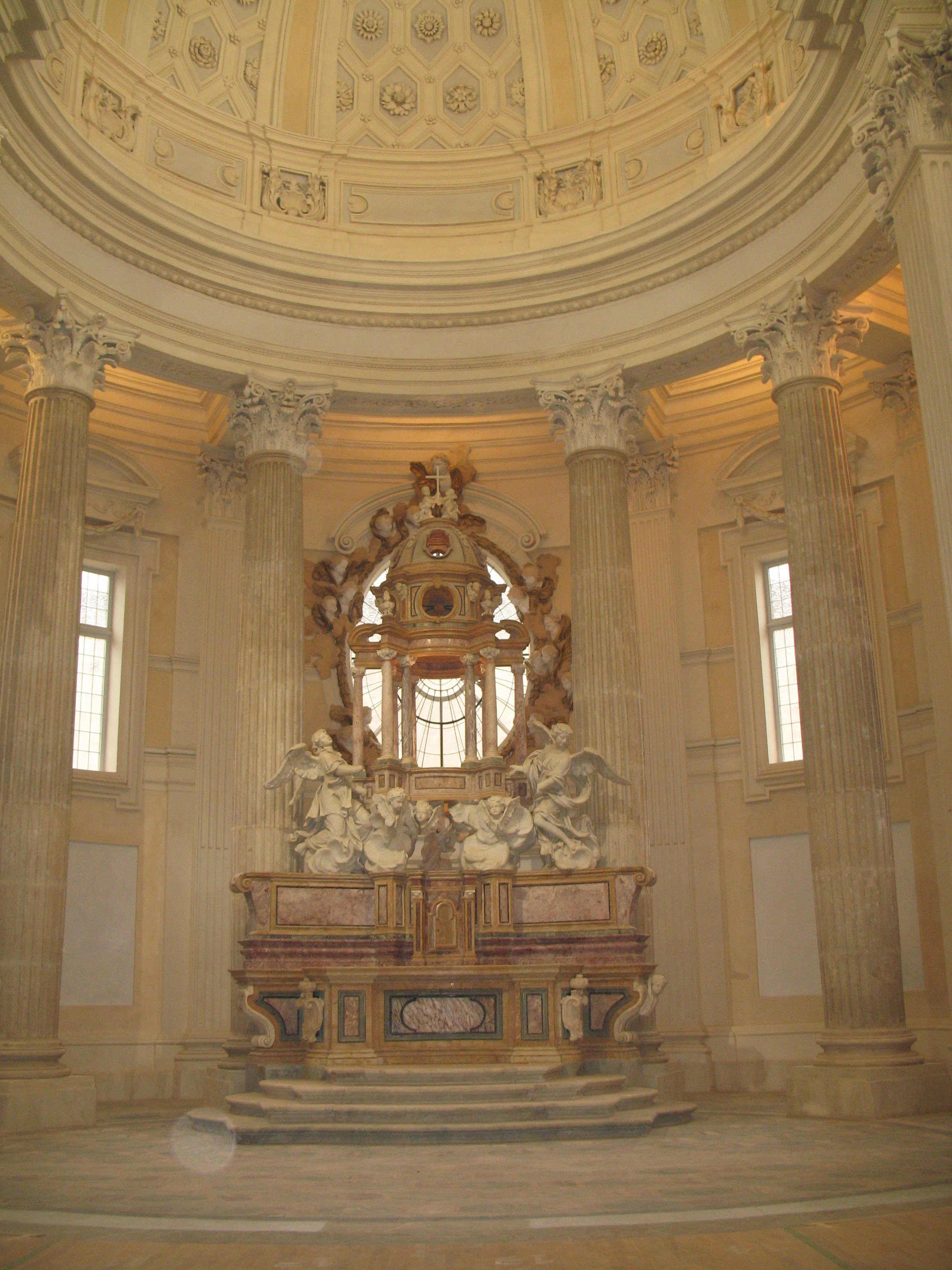 Chiesa di Sant'Uberto, Venaria Reale, altare maggiore, opera di Giovanni Baratta